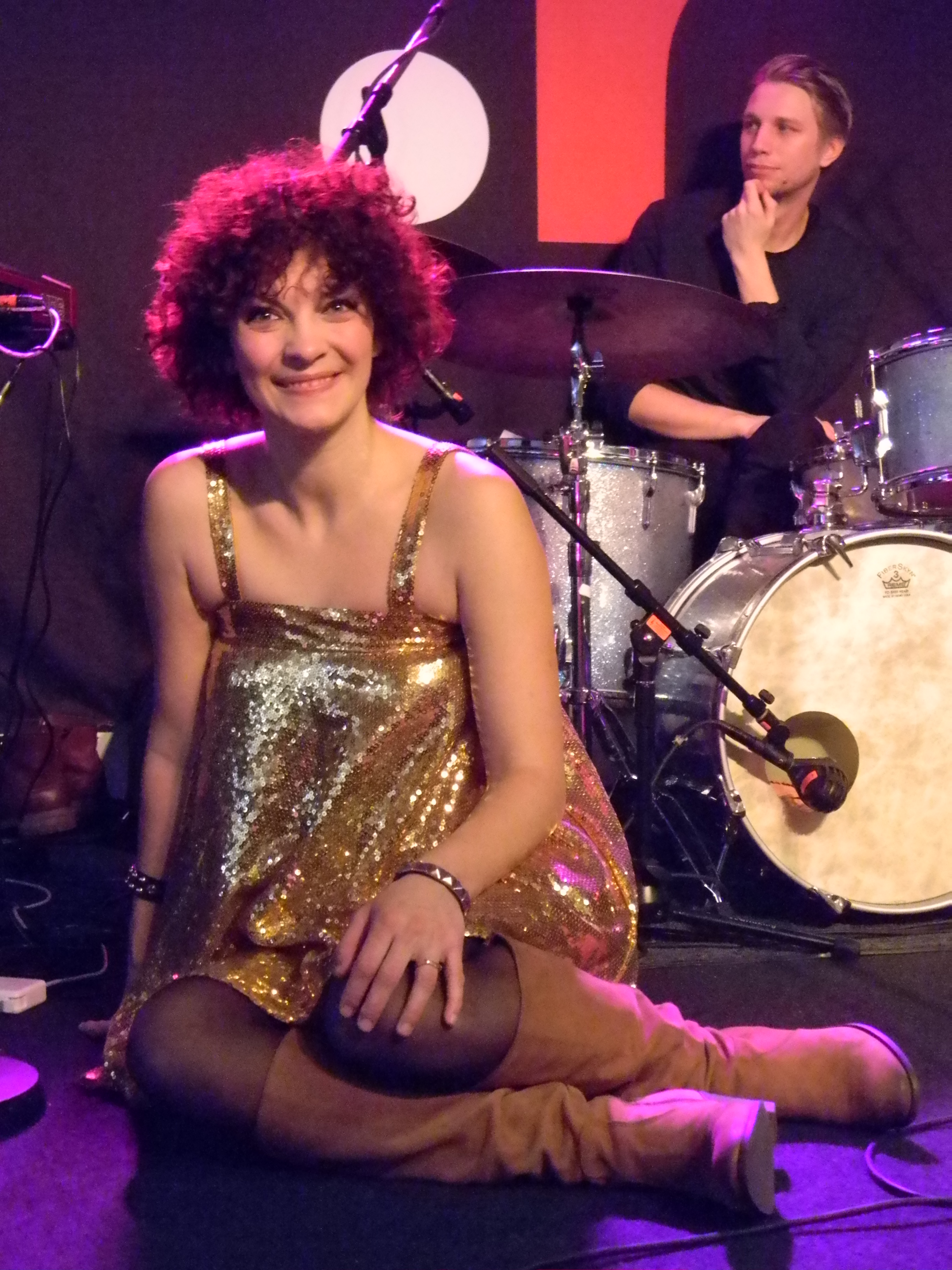 29.02.2012 Schweden